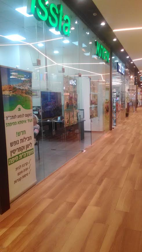 סניף איסתא, חיפה